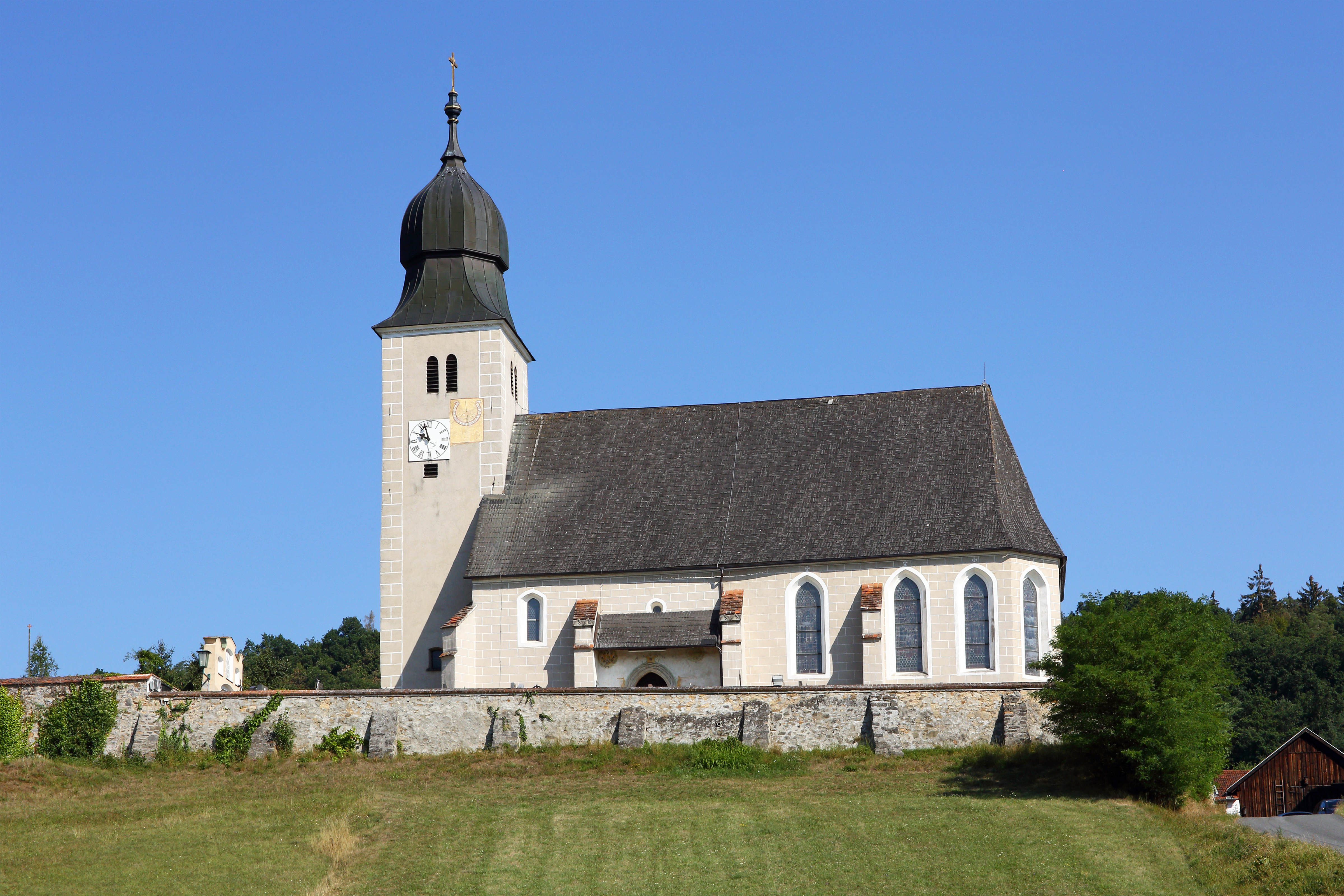 Die auf einem Hügel nördlich des Ortes gelegene und von einem Friedhof umgebene Filialkirche hl. Corona ist eine spätgotische Hallenkirche mit Doppelchor und vorgelagertem Westturm.